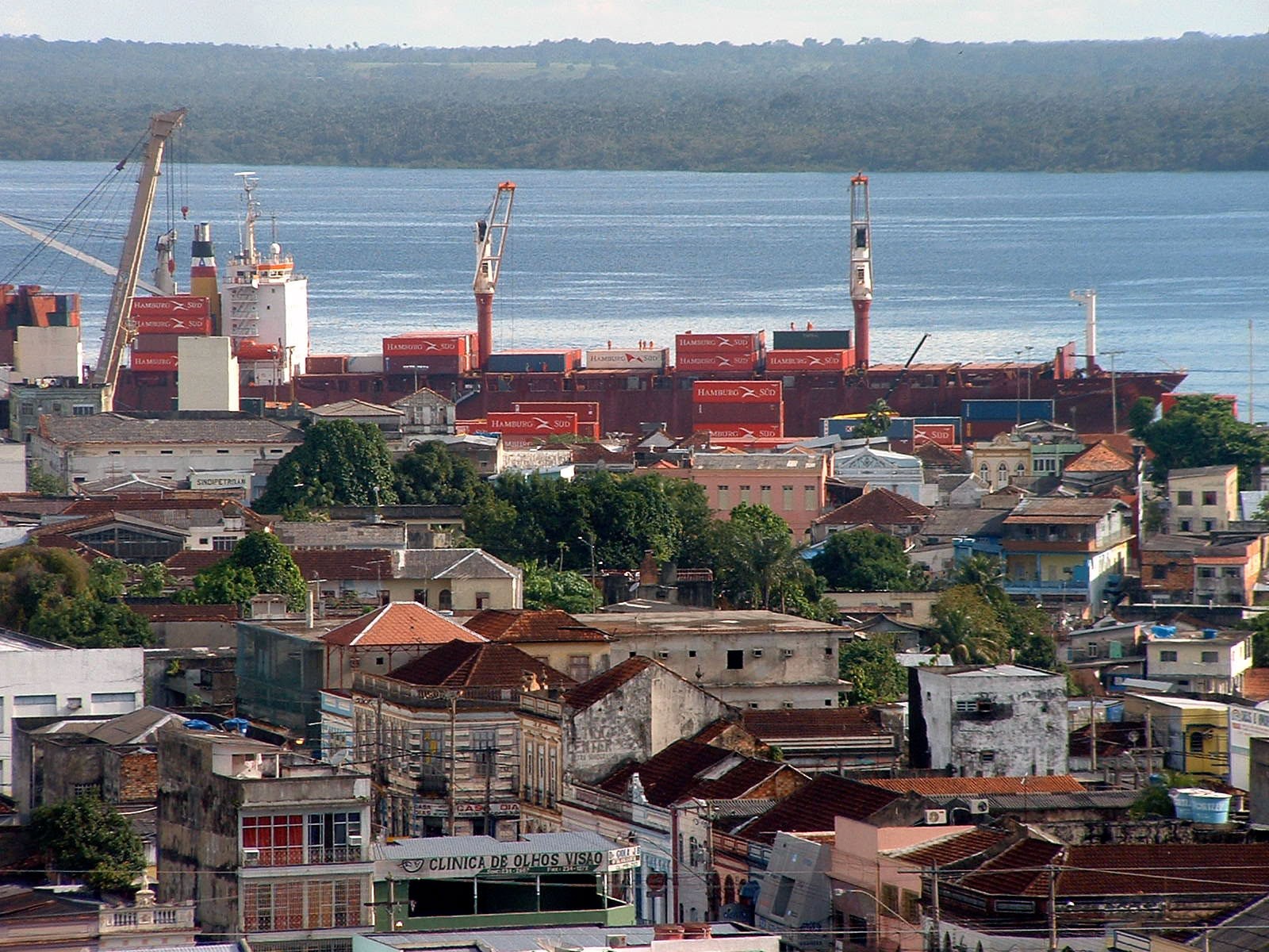 Den Hafe vu Madaus um Rio Negro 2005 Source:Ex-Commons, Foto vum User:Pontanegra; Niwwel eraus, Faarwen dra vum Cornischong